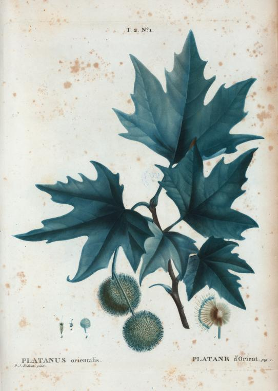 Platanus orientalis = Platane d'Orient.